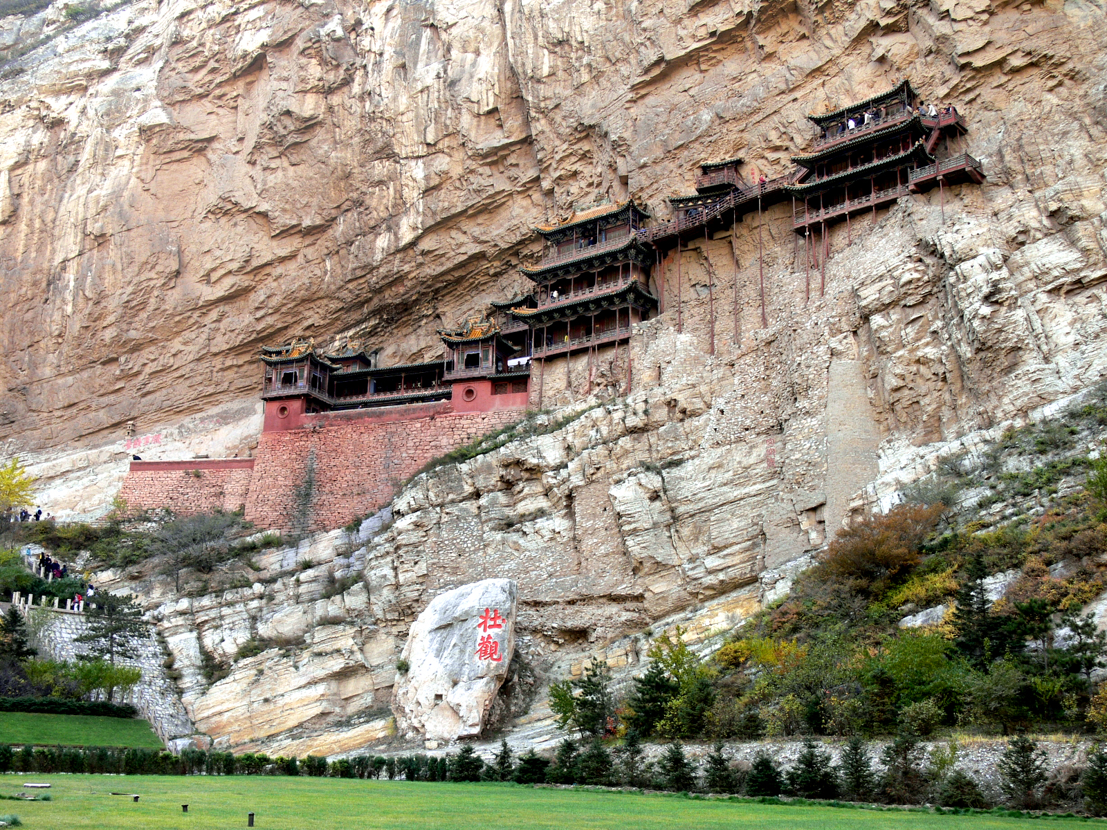 Hanging Temple, Shanxi 悬空寺